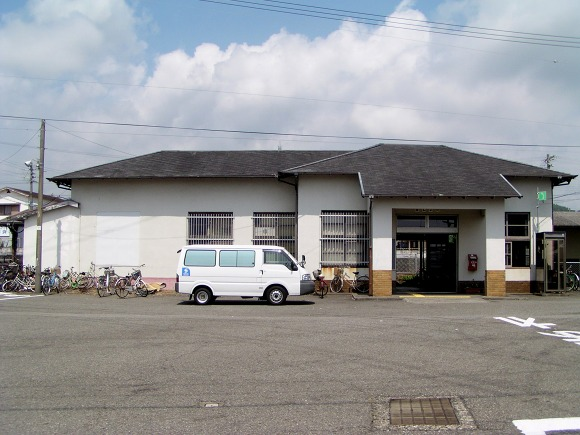 Atawa Station, Mihama, Mie, Japan